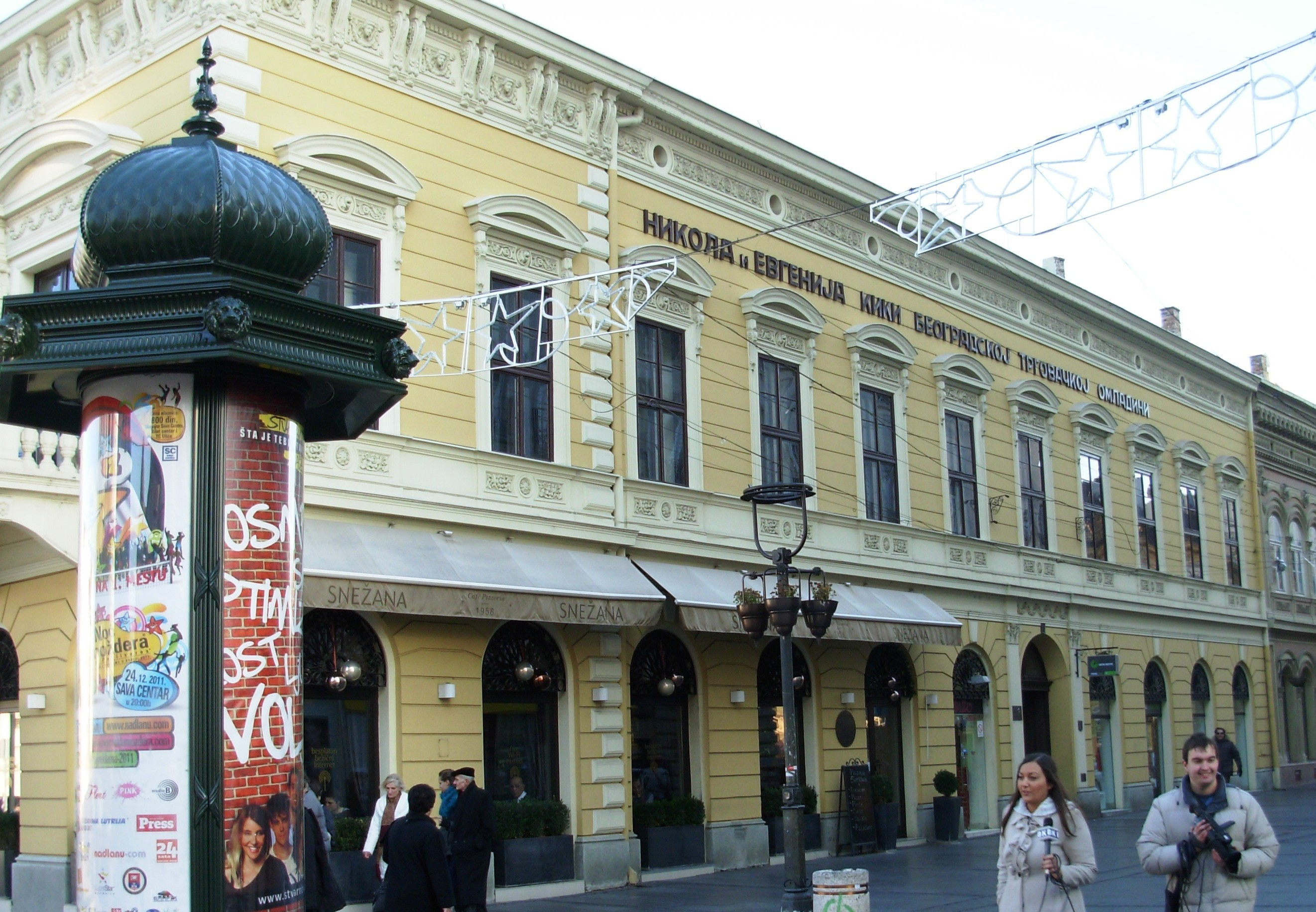 Задужбина Кики, кнез Михајлова, Београд. Сликао Голдфингер